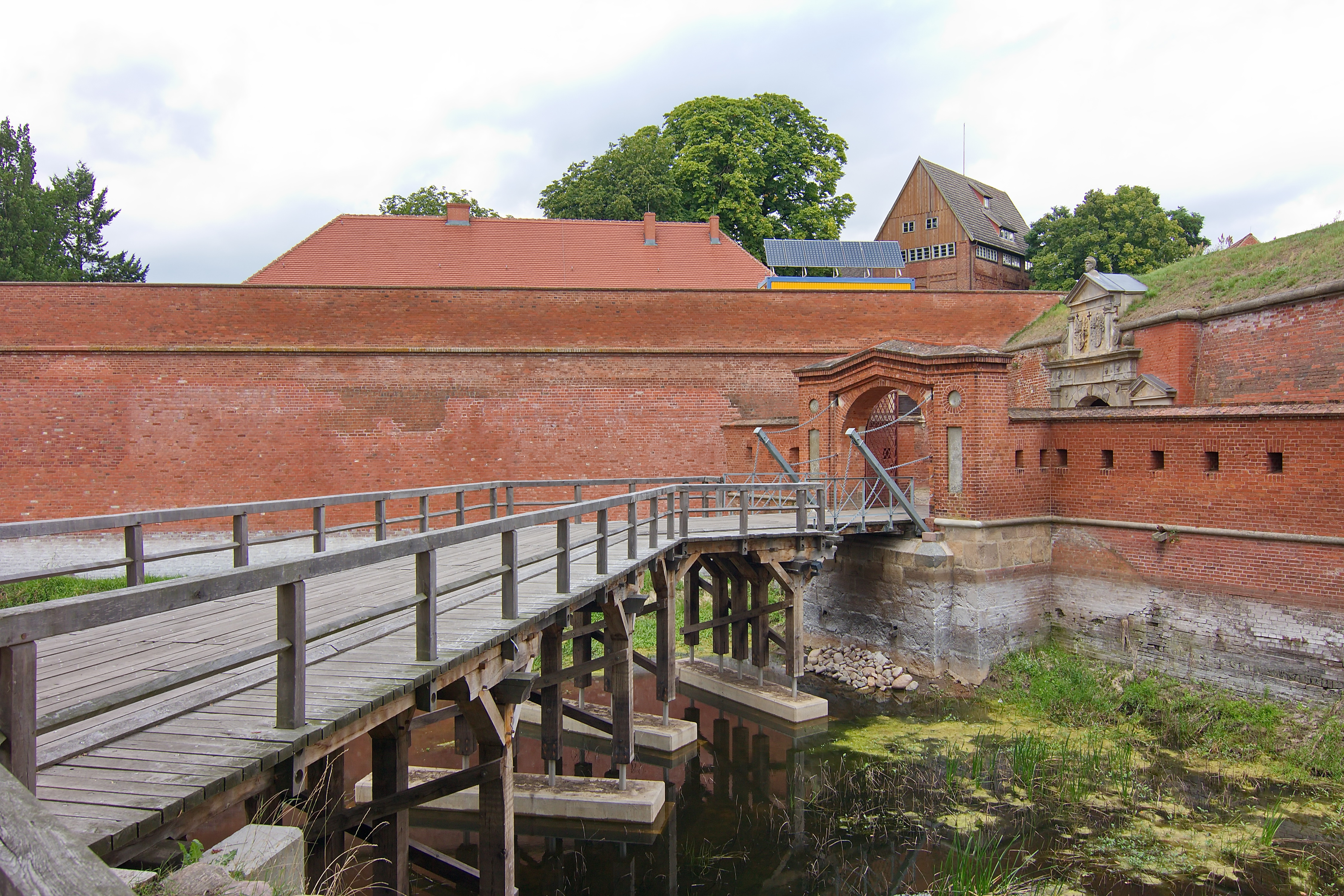 Herzog Johann Albrecht I. ließ die größte Festung Mecklenburgs in Dömitz in den Jahren 1559 bis 1565 errichten